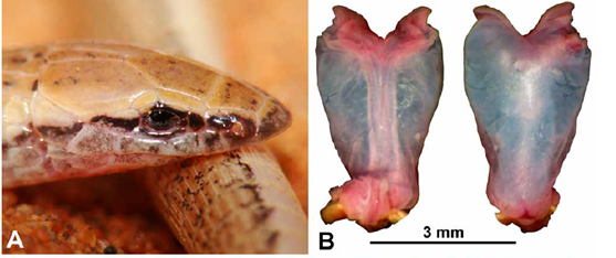 foto da cabeça e hemipênis de B. oxyrhina